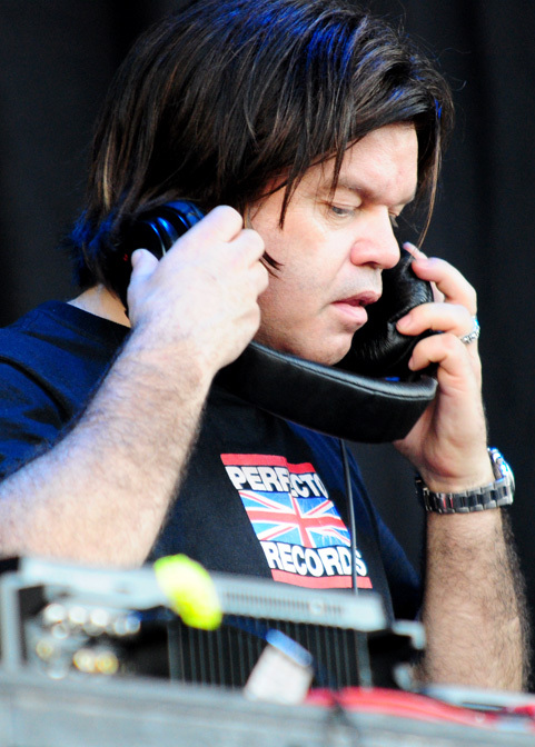 Paul Oakenfold, Future Music Festival 2009